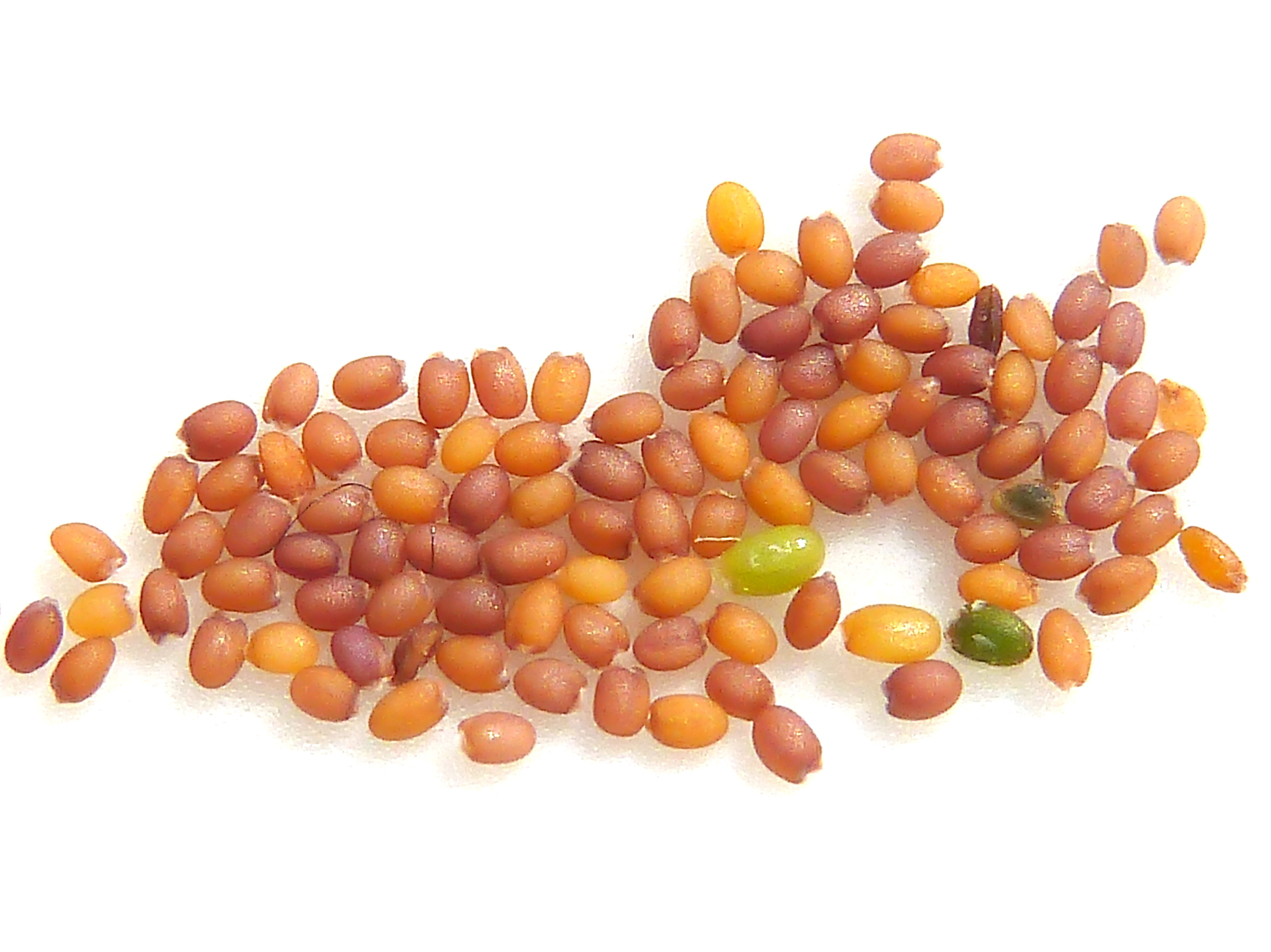 Diplotaxis erucoides (oruga silvestre) - Semillas submaduras sueltas. - Descampado/parking de la biblioteca. Albatera (Provincia de Alicante, España).